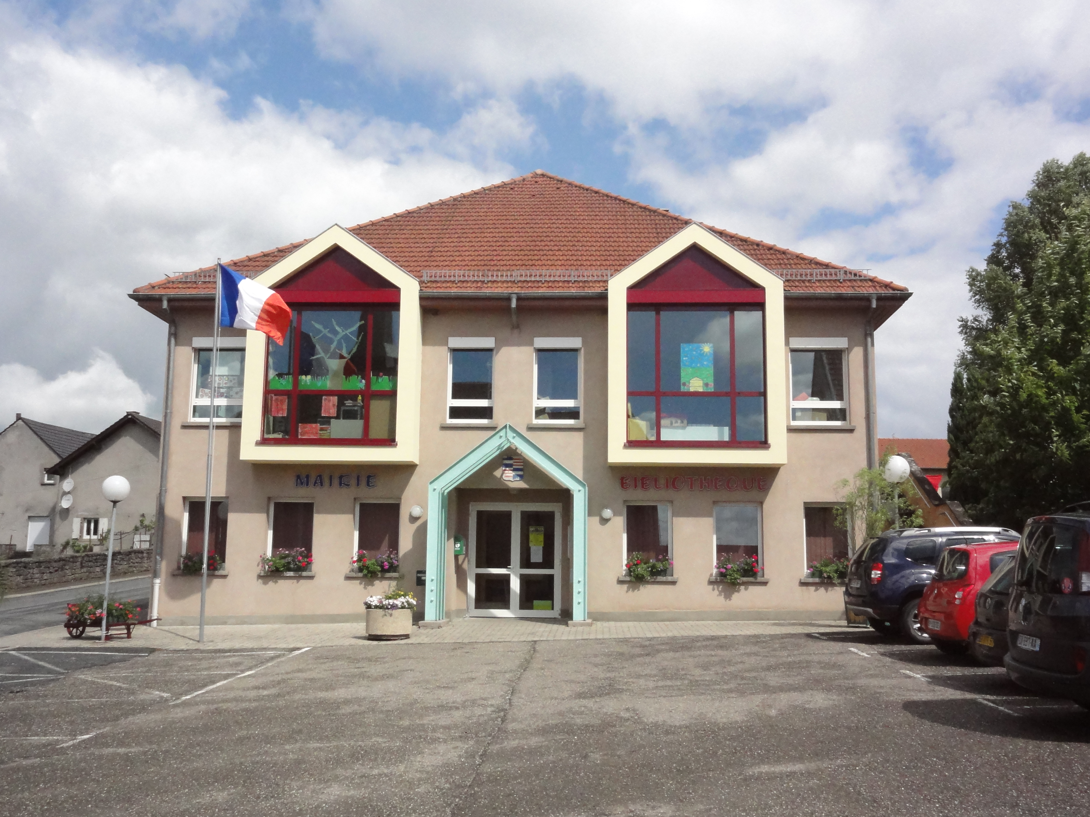 Hilbesheim (Moselle) mairie - bibliothèque